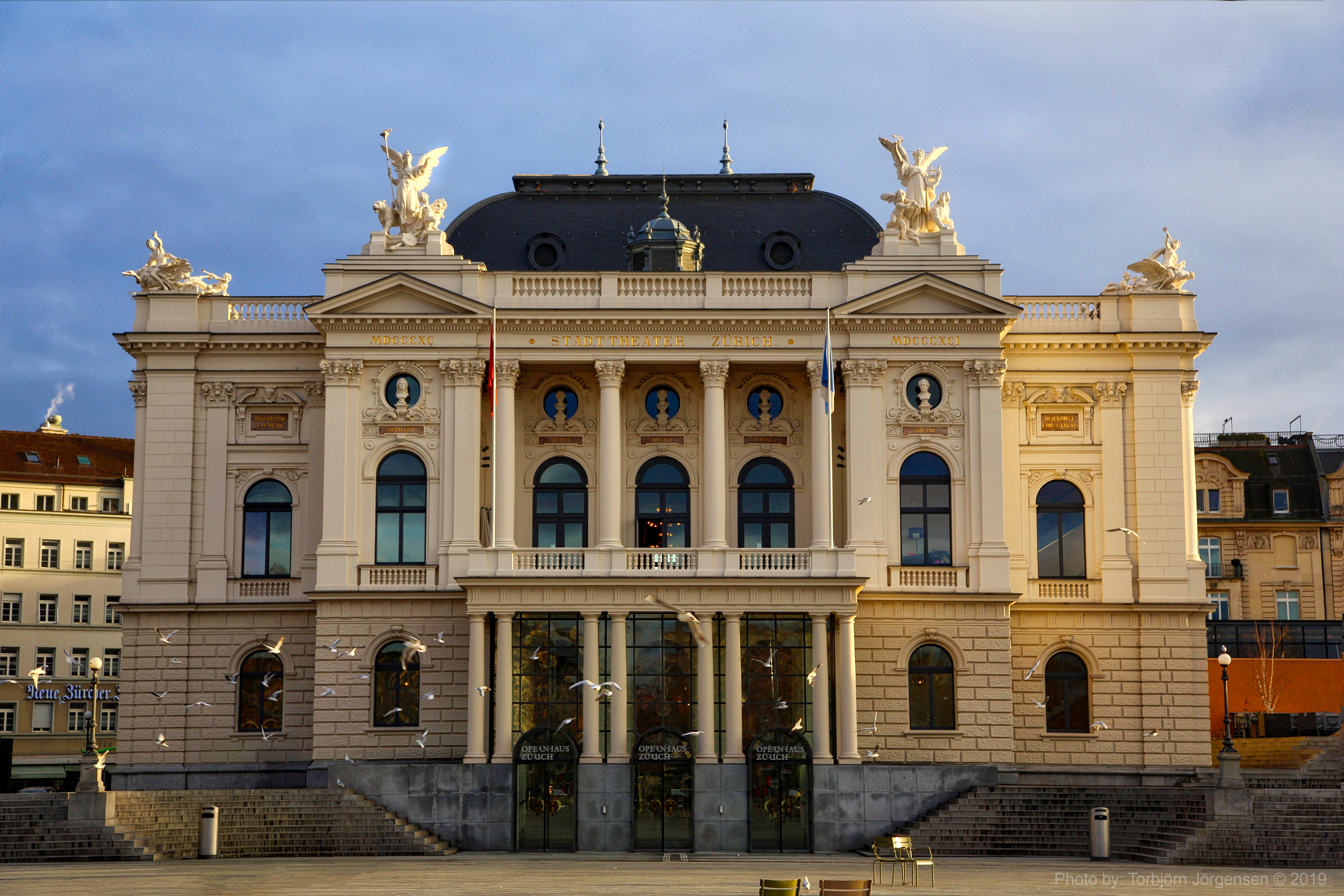 Operahaus Zürich